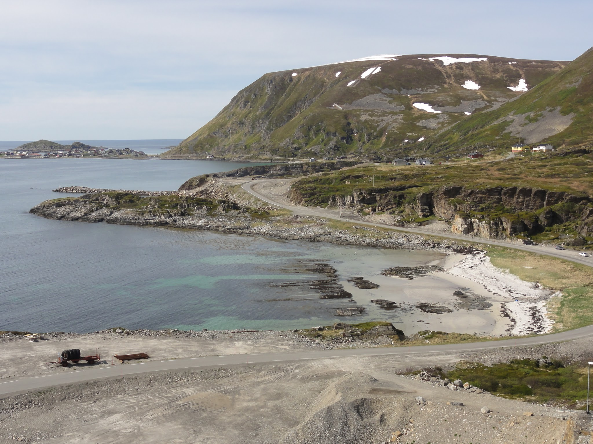 Hespervika, Sørøya, Nórsko, 2013